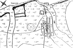 План міста і фортеці Гаджибей", 1766